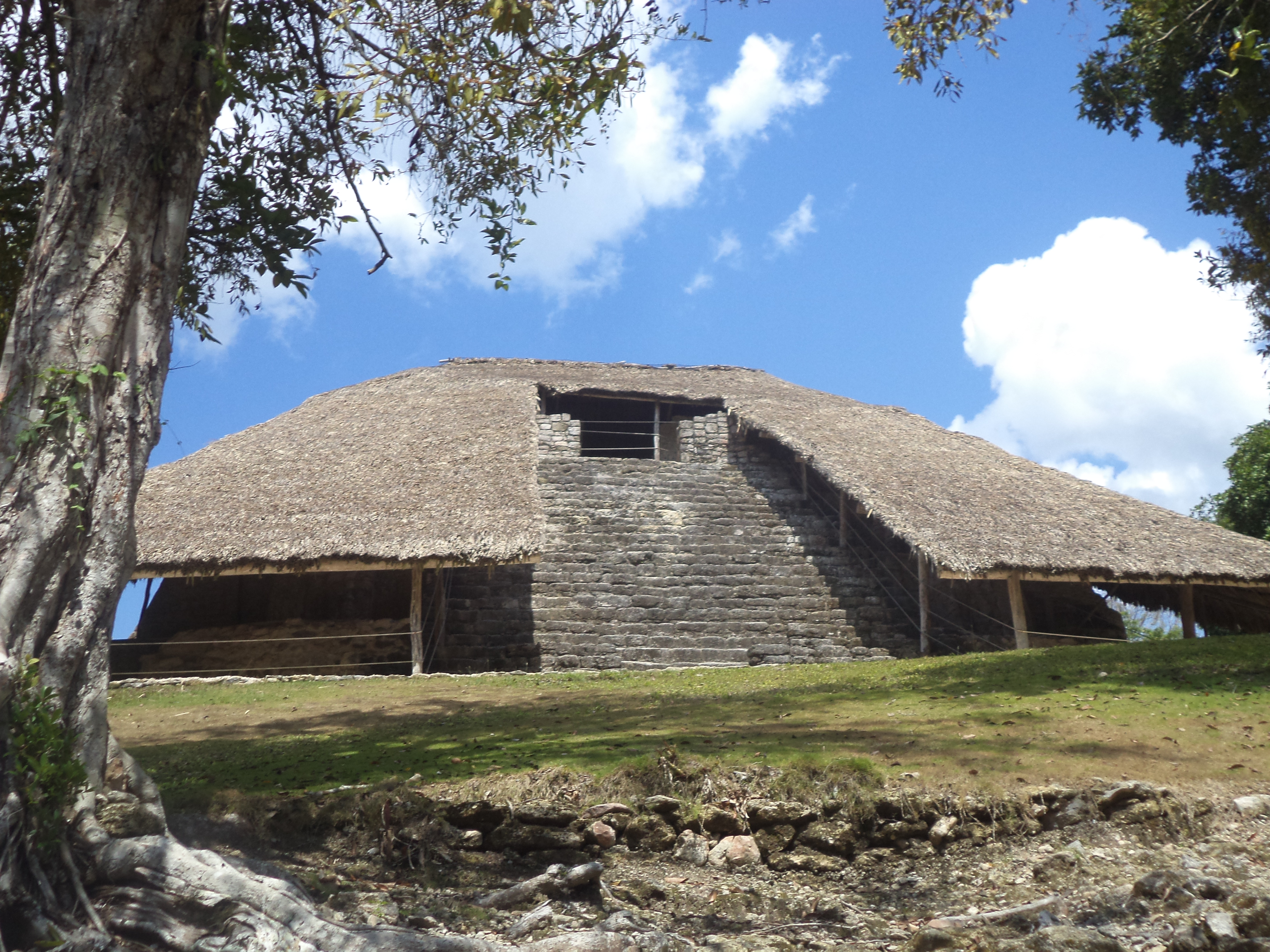 Kohunlich